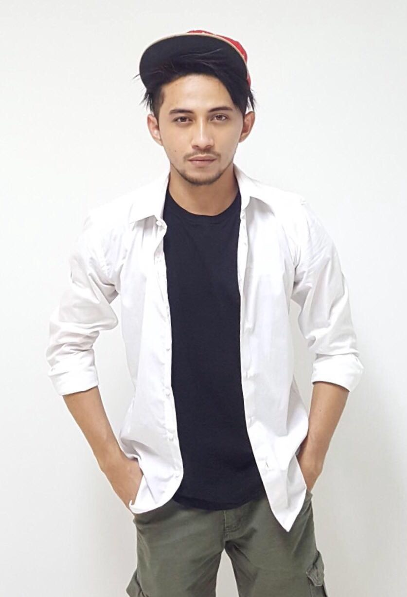 Juan Azmi in teenager costume